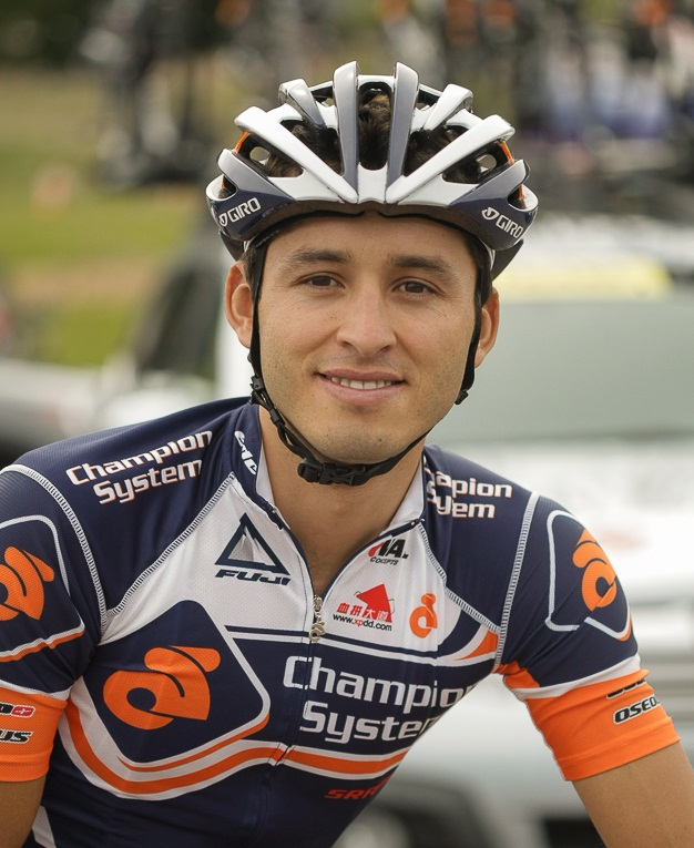 Gregory Brenes en el Tour de Utah 2013